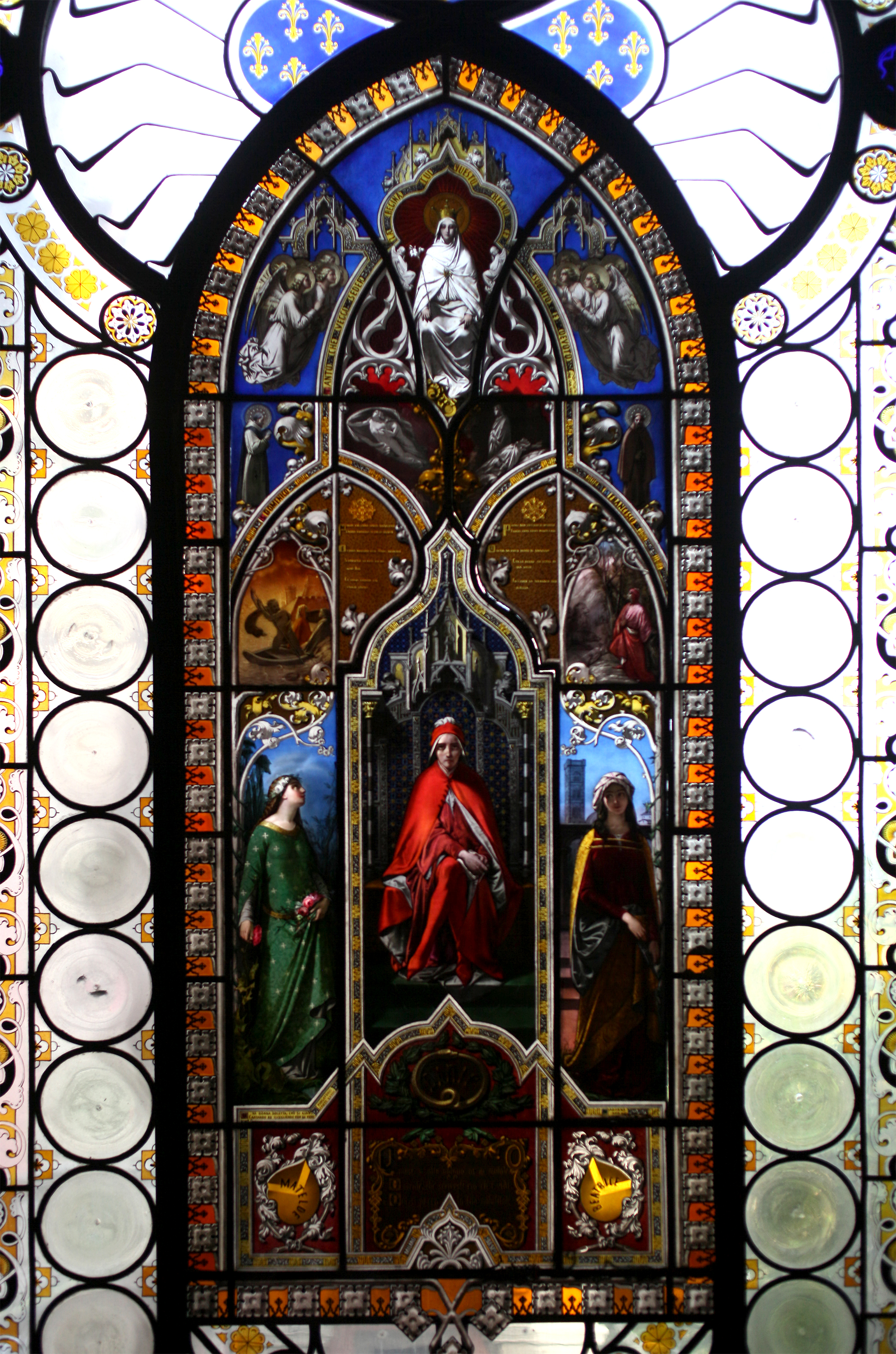 Giuseppe Bertini (1825-1898) Vetrata al Museo Poldi Pezzoli, Milano (1851)